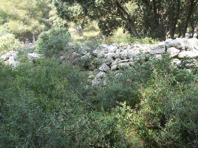 Photo de la partie sud-est des vestiges du rempart de l'oppidum de Castillon (Port-de-Bouc) prise le 25 avril 2010. La partie la plus proche des vestiges est le côté sud du rempart.